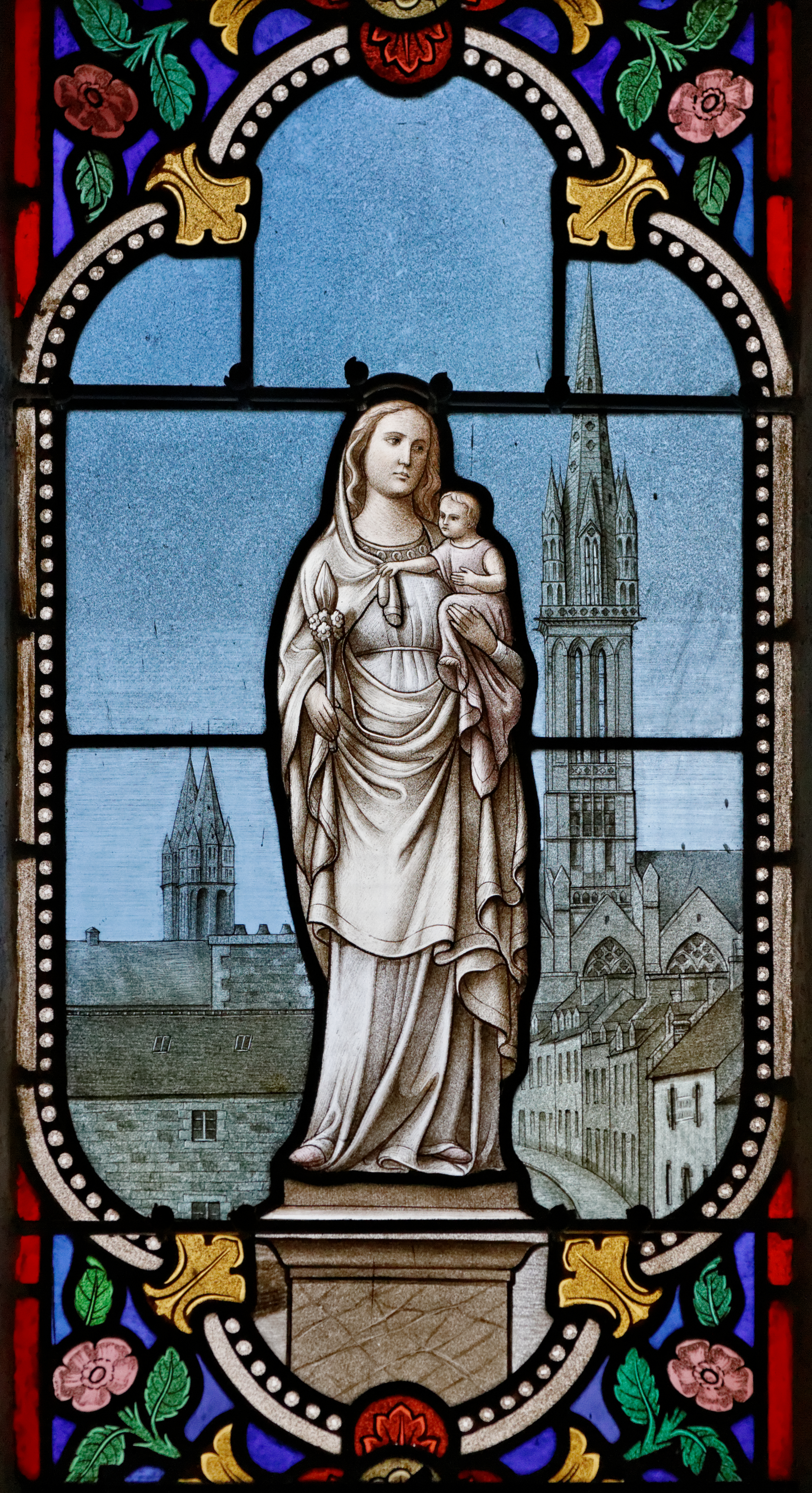 Baie 9 de la cathédrale Saint-Corentin à Quimper dans le Finistère. 1ère lancette, 4ème registre. Notre-Dame du Kreisker, Saint-Pol-de-Léon. Itron Varia ar C'hreiz-Kêr, Kastell Paol.